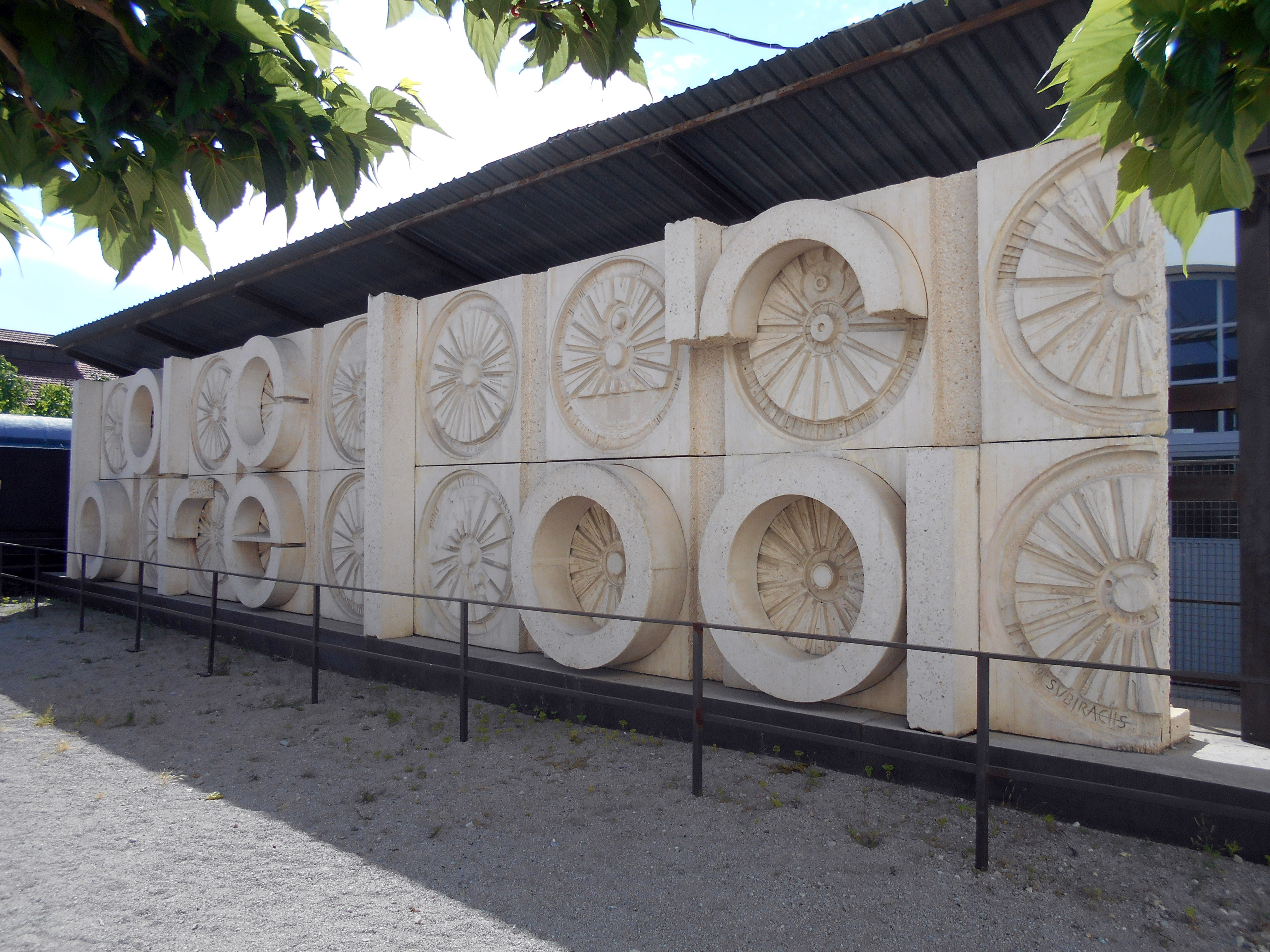 Friso de la Estación de Sants, de Josep Maria Subirachs (1979), Museo del Ferrocarril de Cataluña.